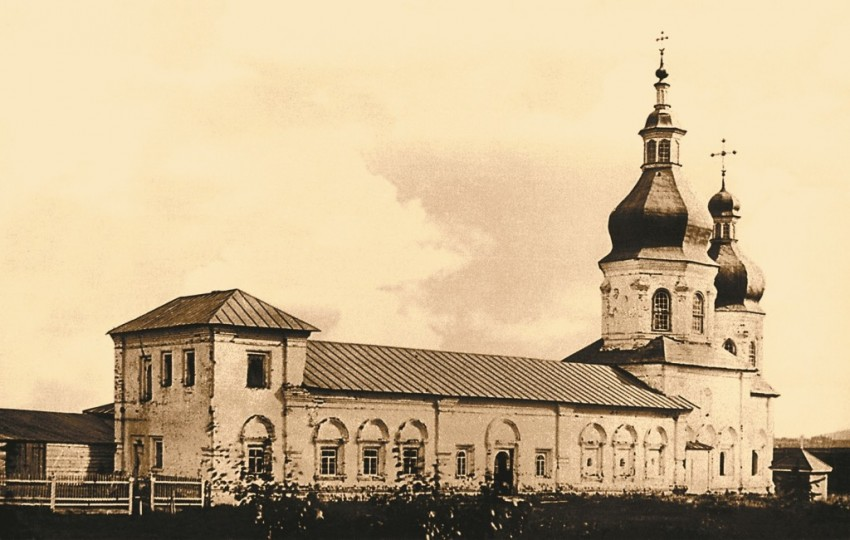 Фото церкви Сорока мучеников (Зосимы и Савватия) в Тюмени. Построена в 1706-1717 гг., снесена в 1946 г.